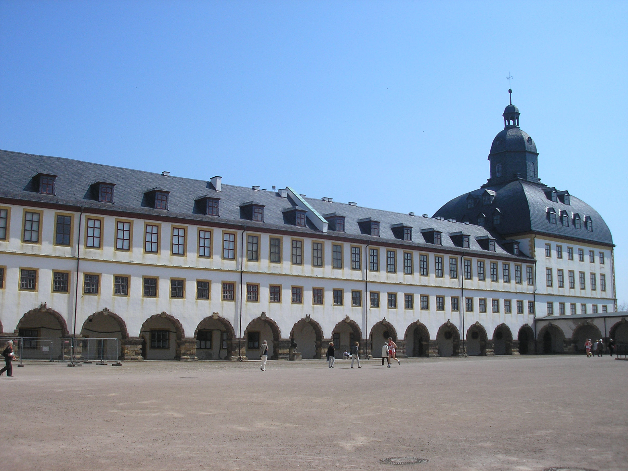 Der Ostflügel von Schloss Friedenstein in Gotha (Thüringen).